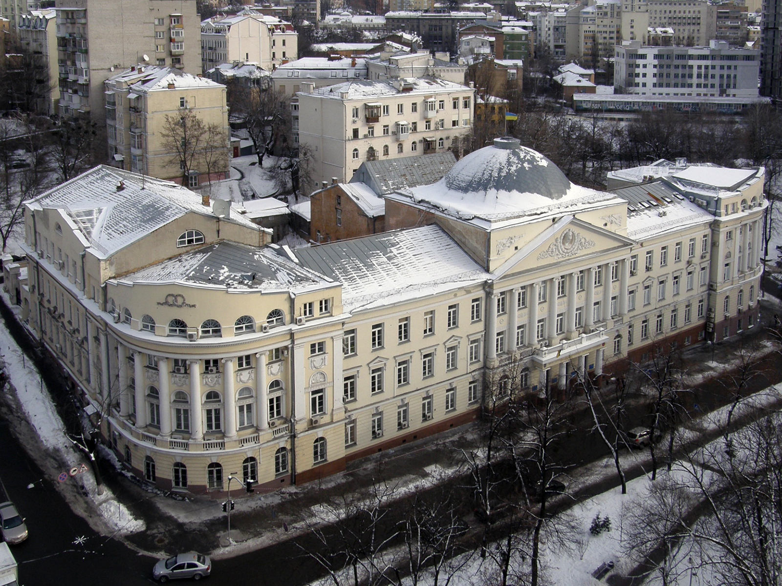 5 сим